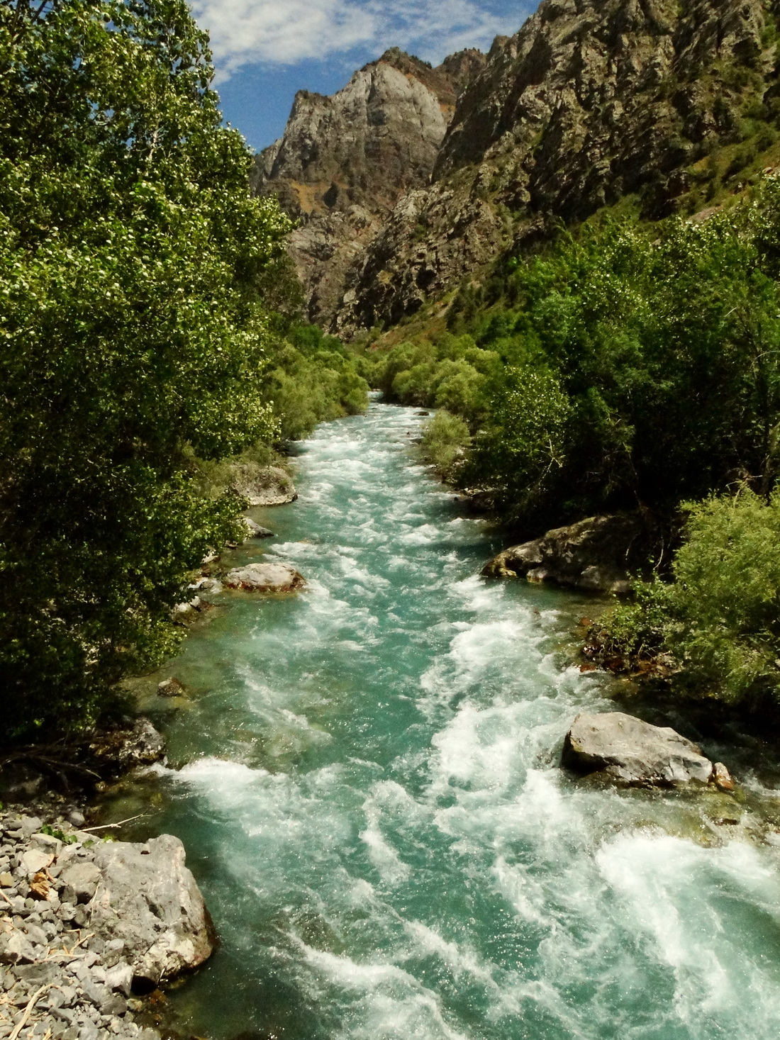 река Коксу, Ташкентская область, Узбекистан